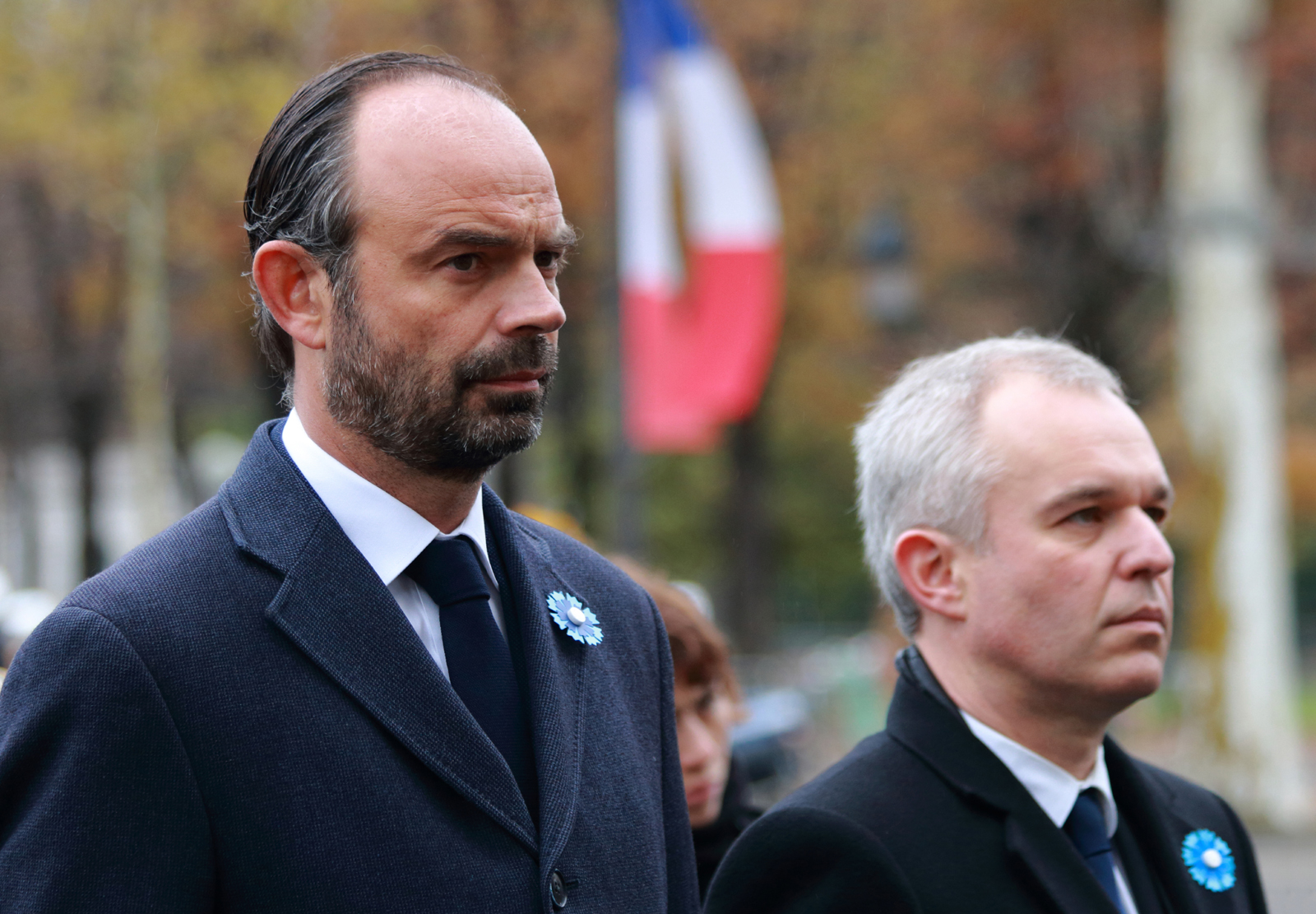 Edouard Philippe et François de Rugy aux cérémonies du 11 novembre 2017 à la statue Clemenceau